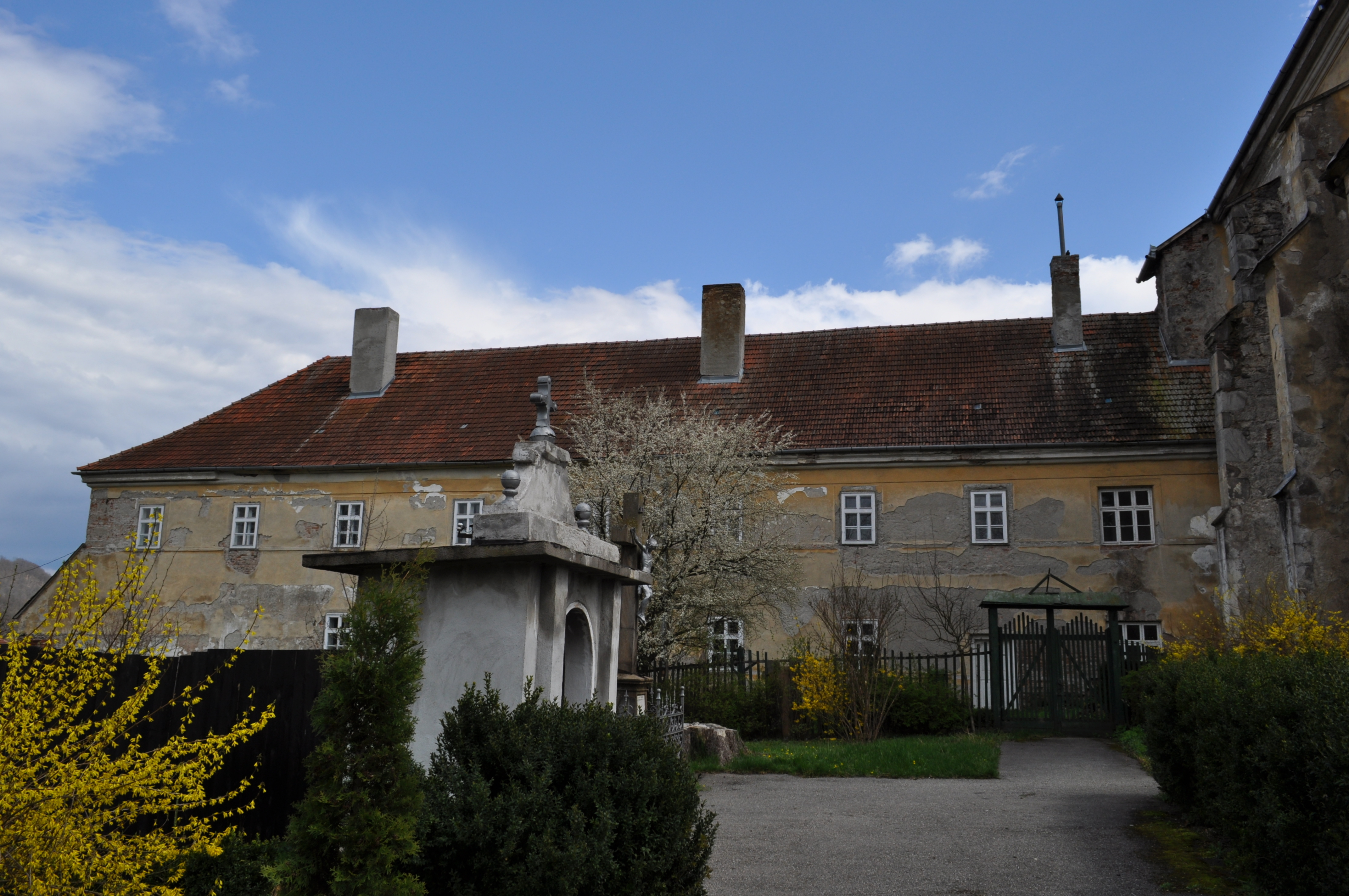 Mănăstirea franciscană, sat BAIA DE CRIŞ; comuna BAIA DE CRIŞ 02